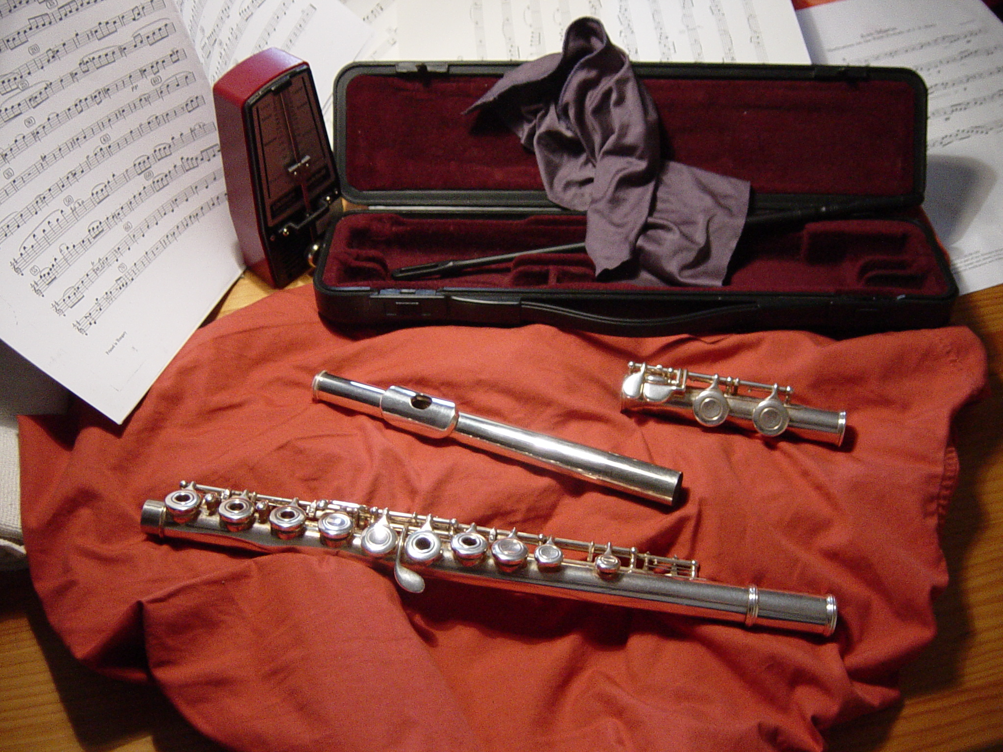 Western concert flute, yamaha 261, opened hole, disassembled; flauta travesera de platos abiertos yamaha 261, desmontada